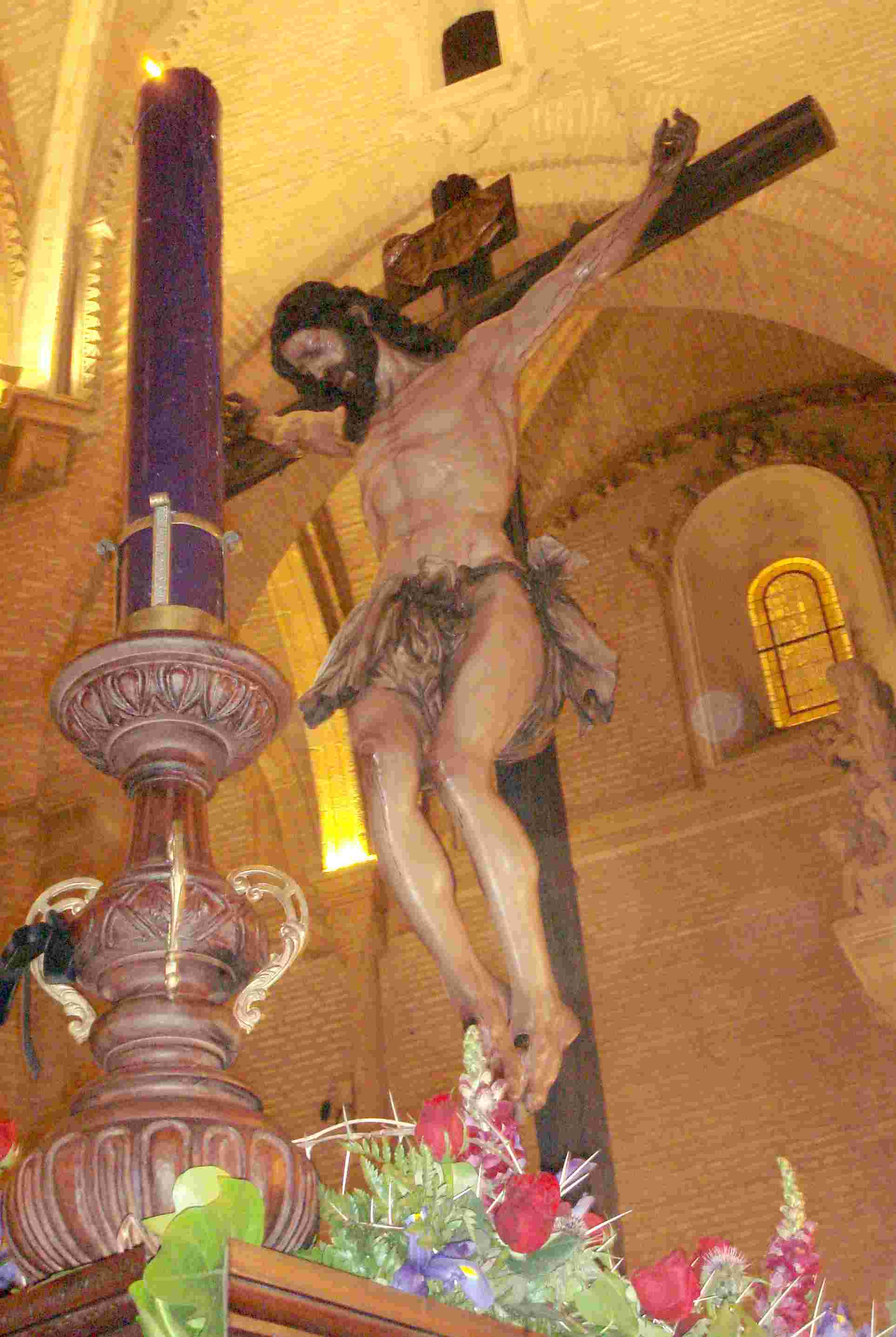 El Cristo de Pasión y Muerte de la Hermandad del mismo nombre, obra de 1997 de José Antonio Navarro Arteaga, procesiona por el barrio de Triana el Viernes de Dolores, haciendo estación de penitencia en la iglesia de Santa Ana. Semana Santa de Sevilla de 2007.